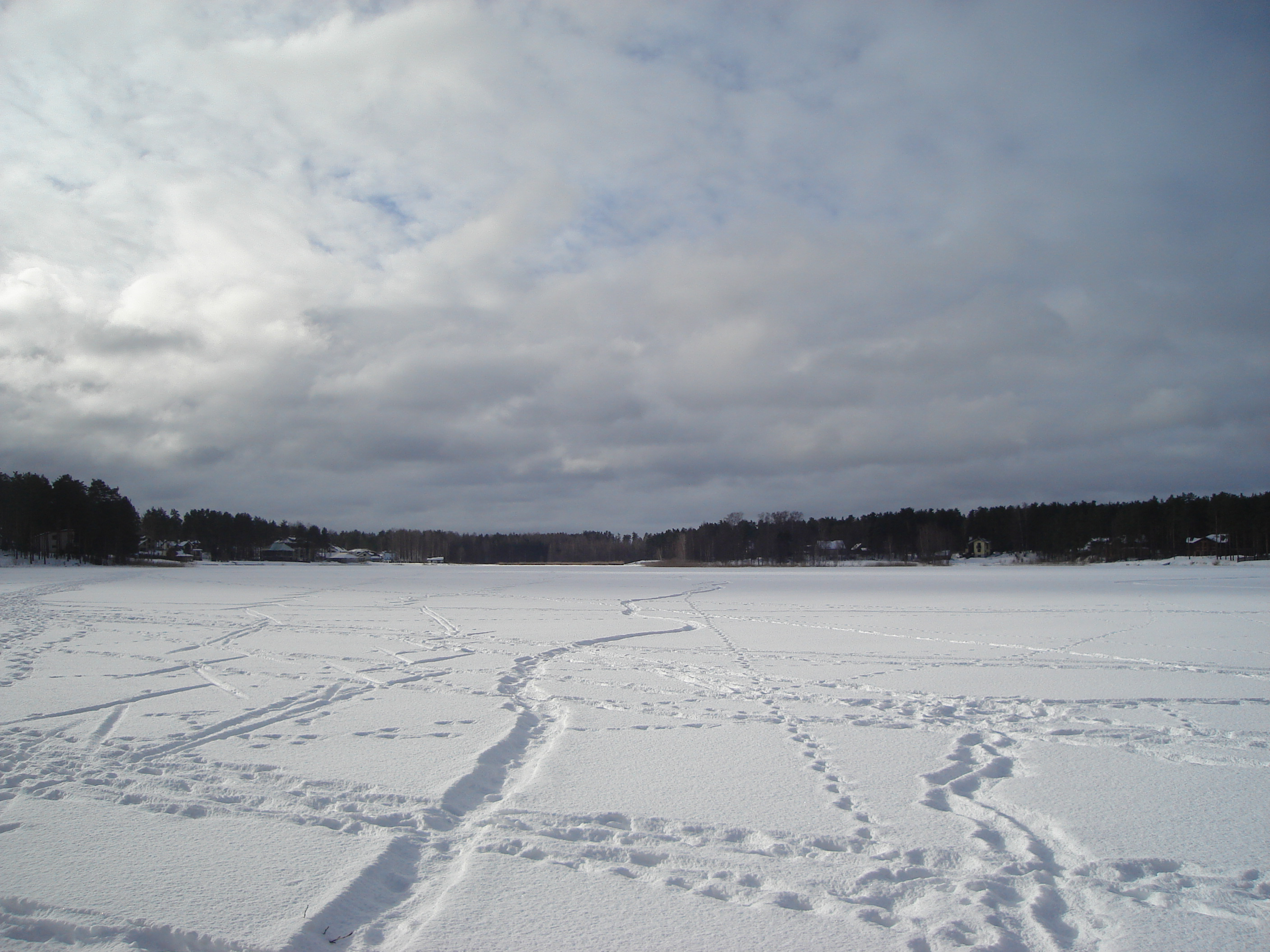 Sunīšu ezers ziemā